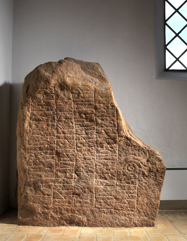 Foto af Roberto Fortuna